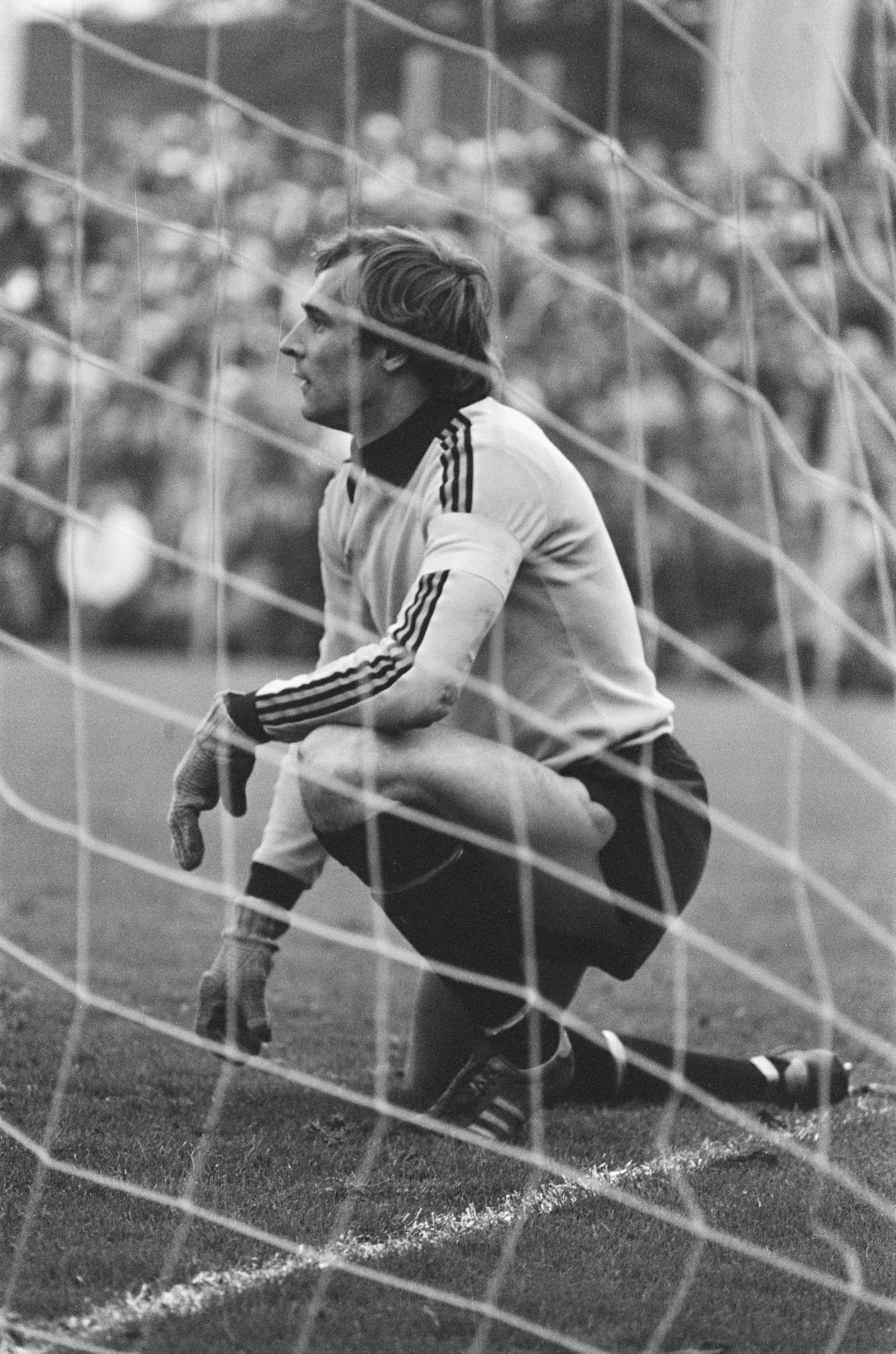 Collectie / Archief : Fotocollectie Anefo Reportage / Serie : [ onbekend ] Beschrijving : PSV tegen Feyenoord 2-3; Jan van Beveren verslagen in zijn doel Datum : 24 oktober 1976 Trefwoorden : sport, voetbal Persoonsnaam : Beveren, Jan van Instellingsnaam : Feyenoord Fotograaf : Peters, Hans / Anefo, [onbekend] Auteursrechthebbende : Nationaal Archief Materiaalsoort : Negatief (zwart/wit) Nummer archiefinventaris : bekijk toegang 2.24.01.05 Bestanddeelnummer : 928-8463